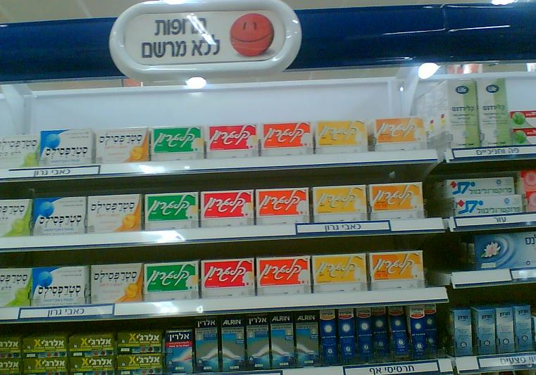 דוכן תרופות ללא מרשם, סופרפארם. צילם דוד שי